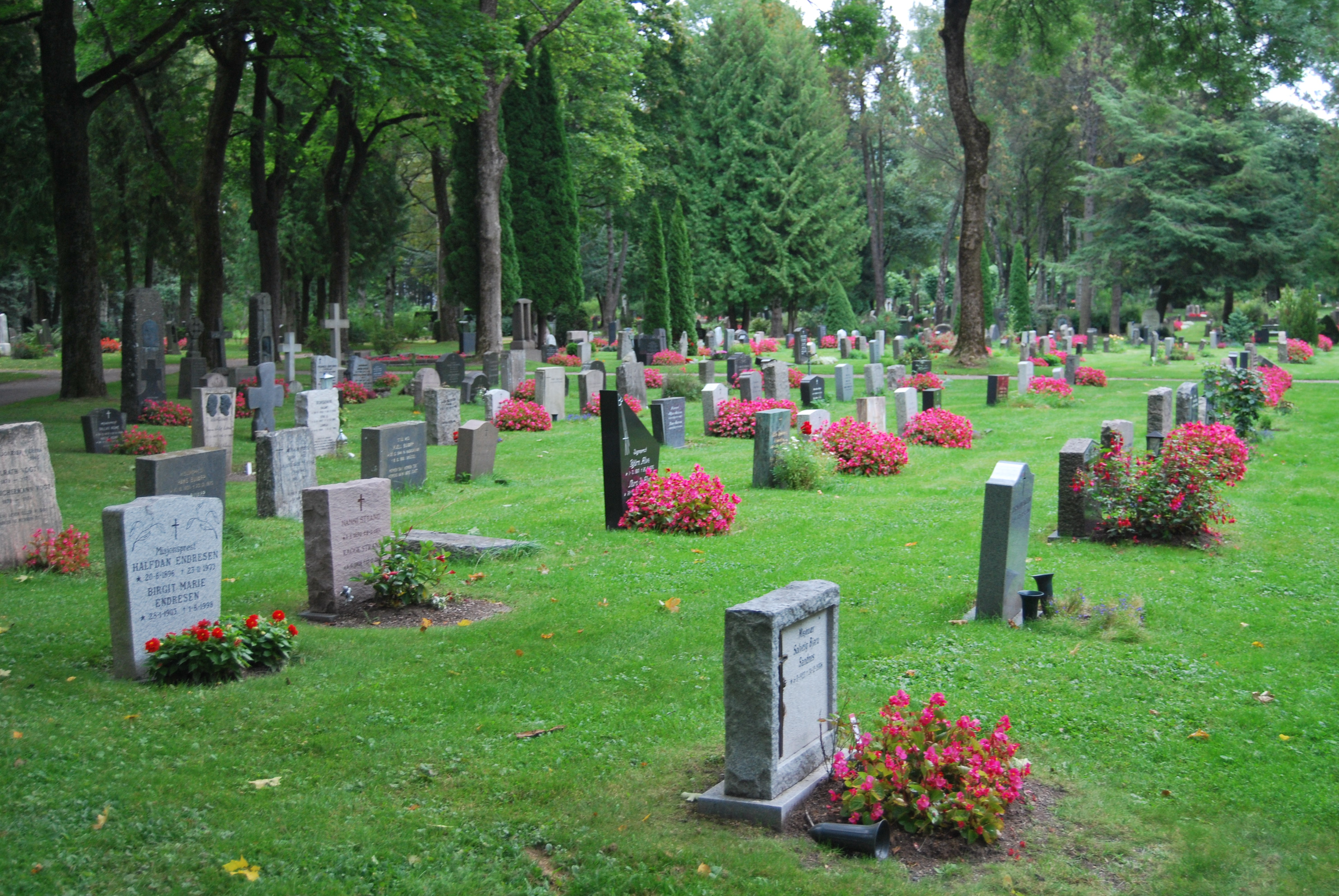 Vestre gravlund. Cmentarz.